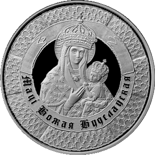 400 гадоў прабывання цудатворнага абраза Маці Божай у Будславе, намінал:10 рублёў